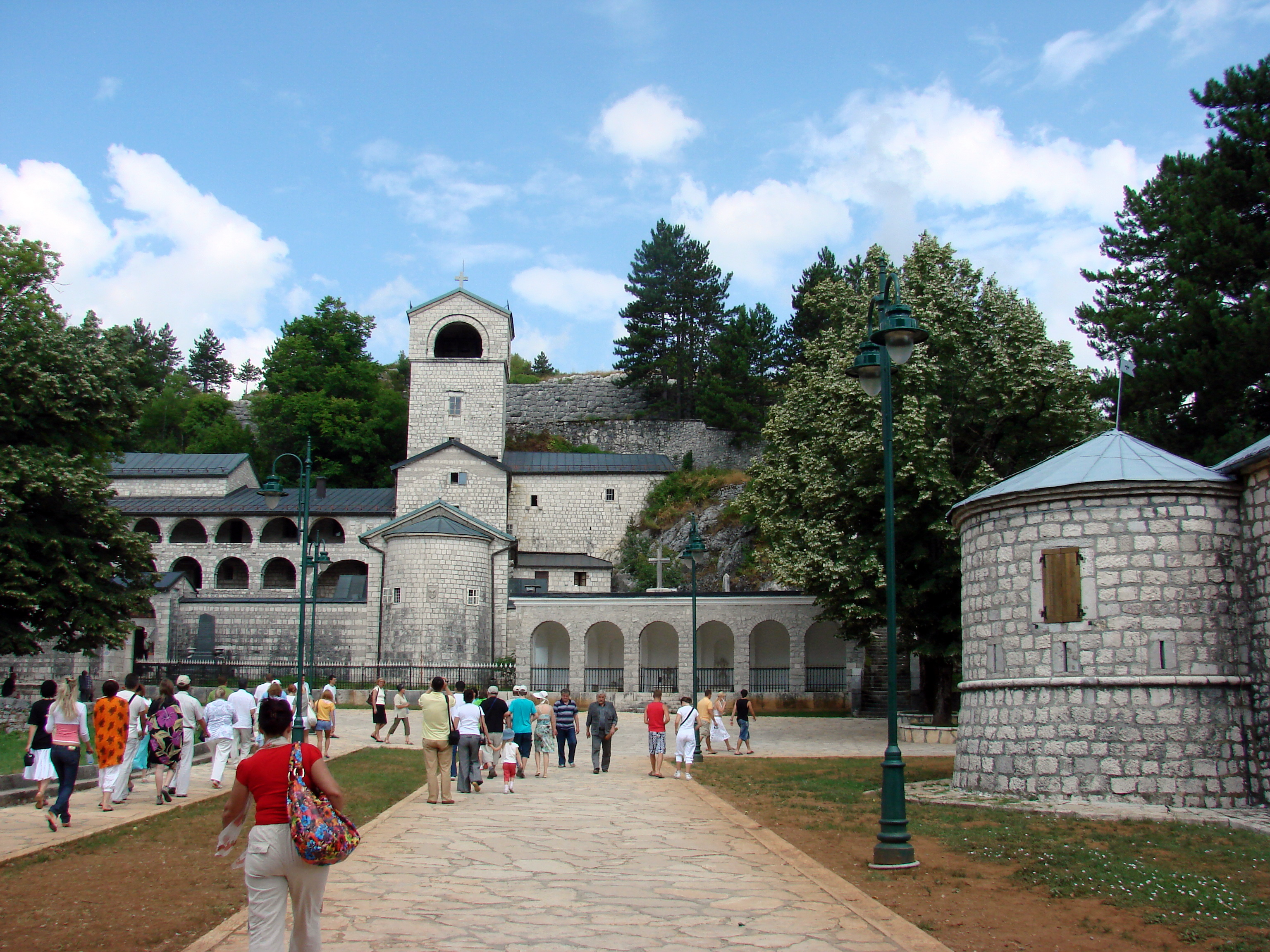 Cetinje